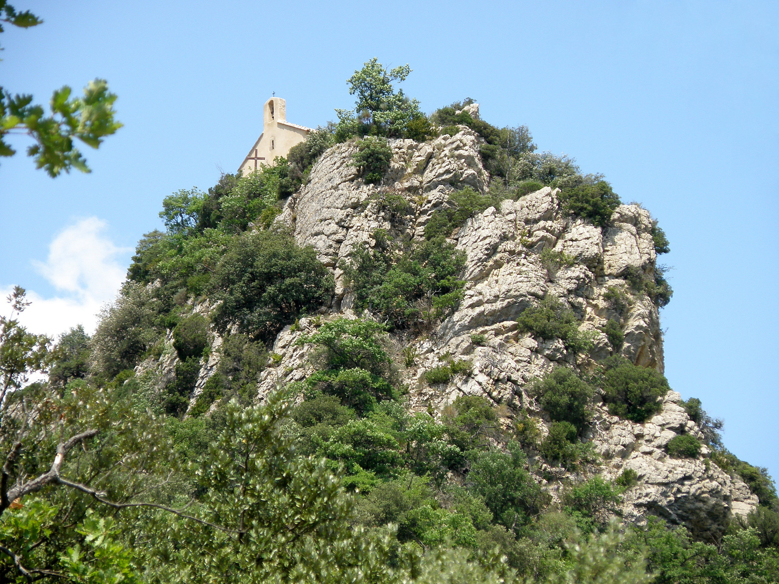 Bénivay-Ollon (Drôme, France). Chapelle Saint-Jean.